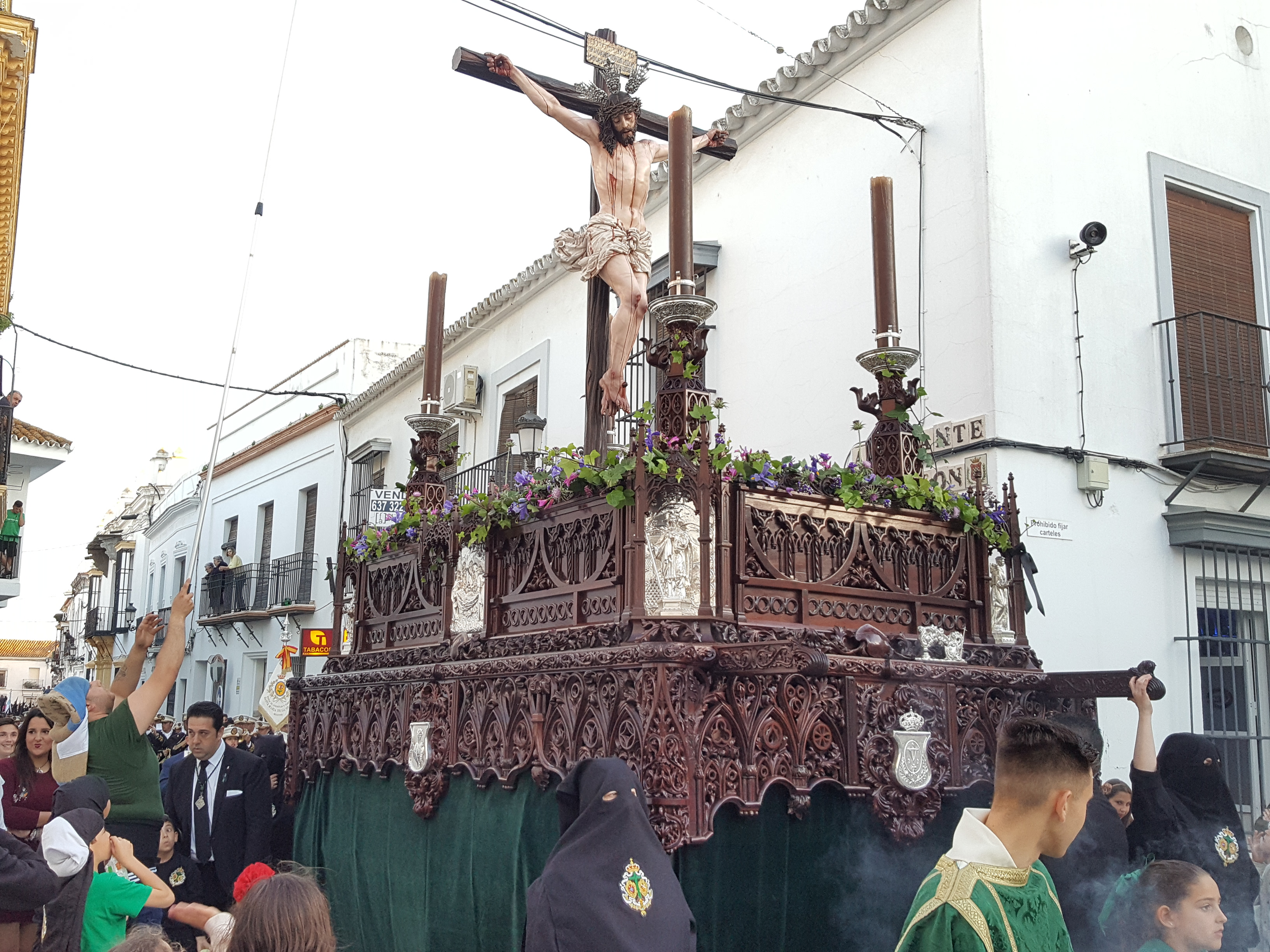 Hermandad del Cristo de la Vera-Cruz. Desfile procesional del Viernes Santo tarde. Vista de paso del Cristo de la Vera-Cruz por el casco urbano de Moguer